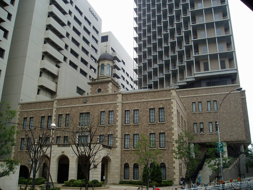 Osaka-fu Nakatsu Saiseikai Hospital Outline